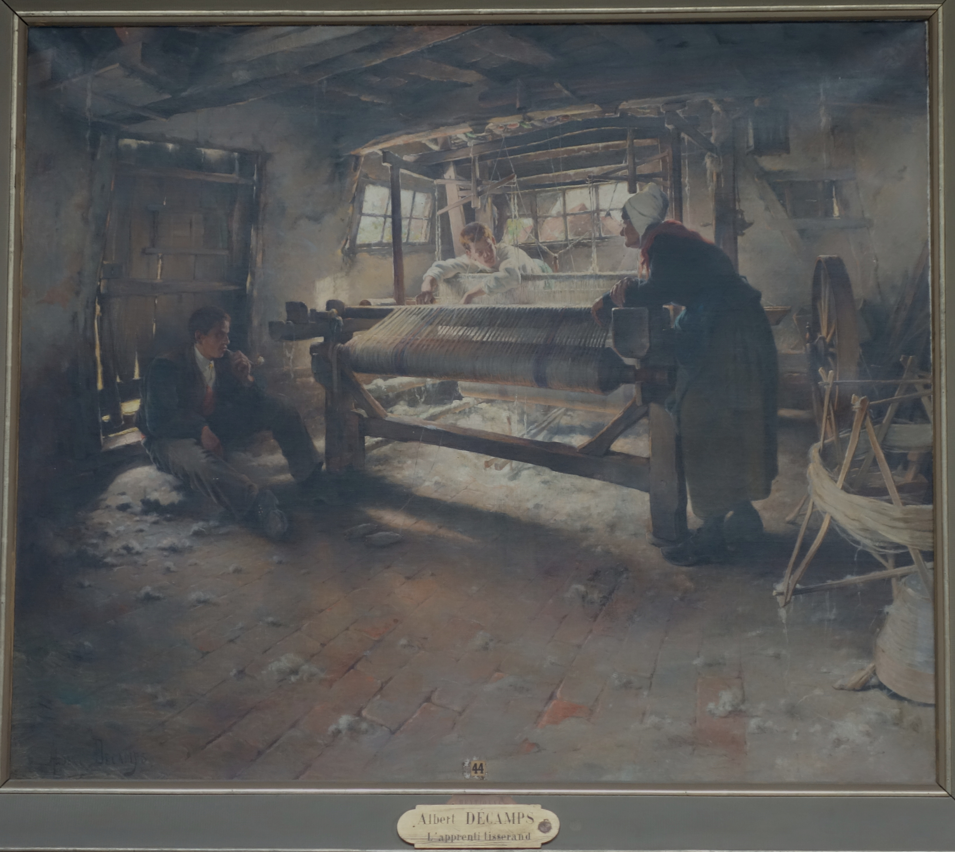 Copyright par courtoisie de Mme A.Jagerschmidt- Musée Boucher-de-Perthes, Abbeville.